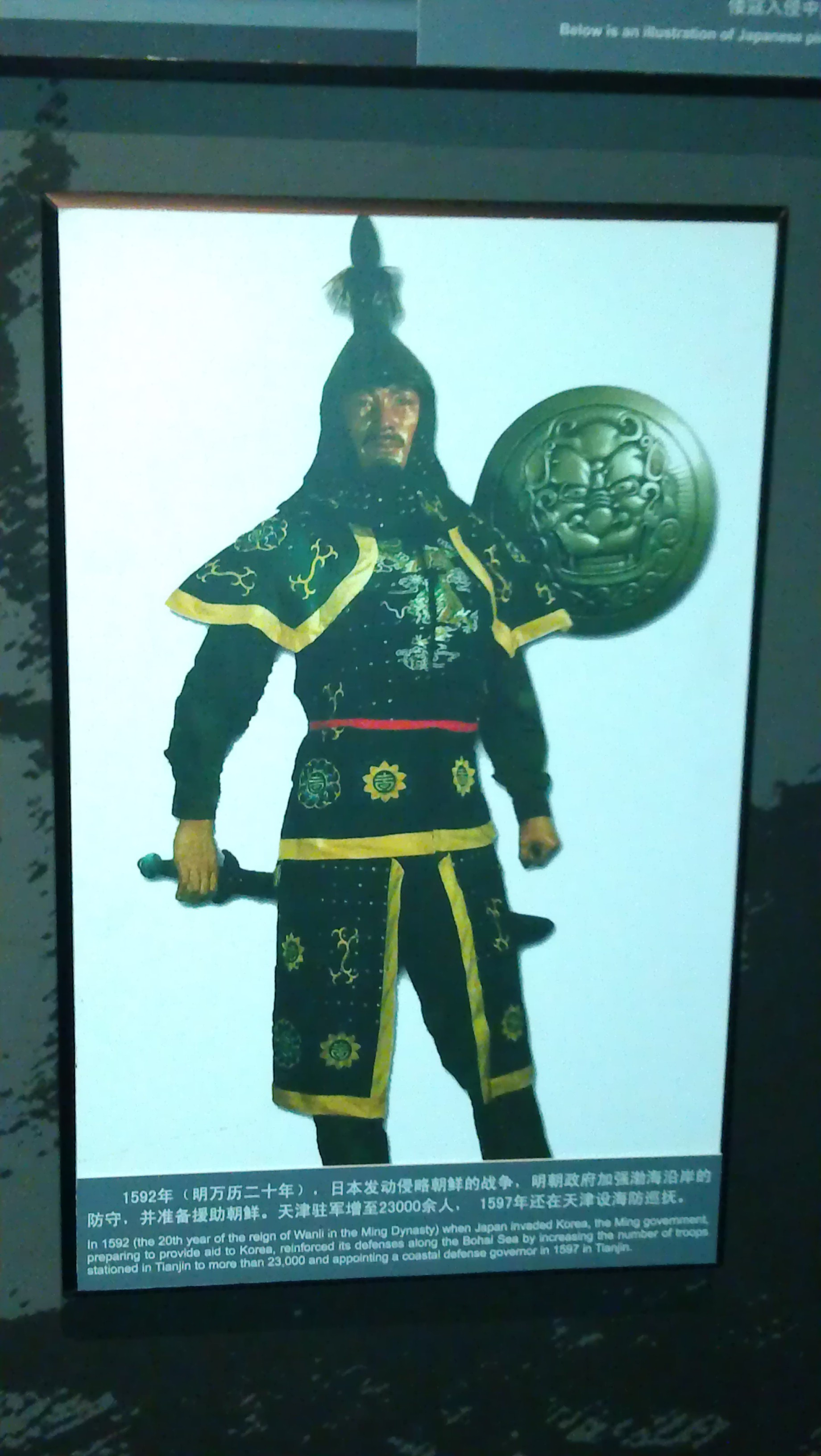 1592明代天津海防簡述